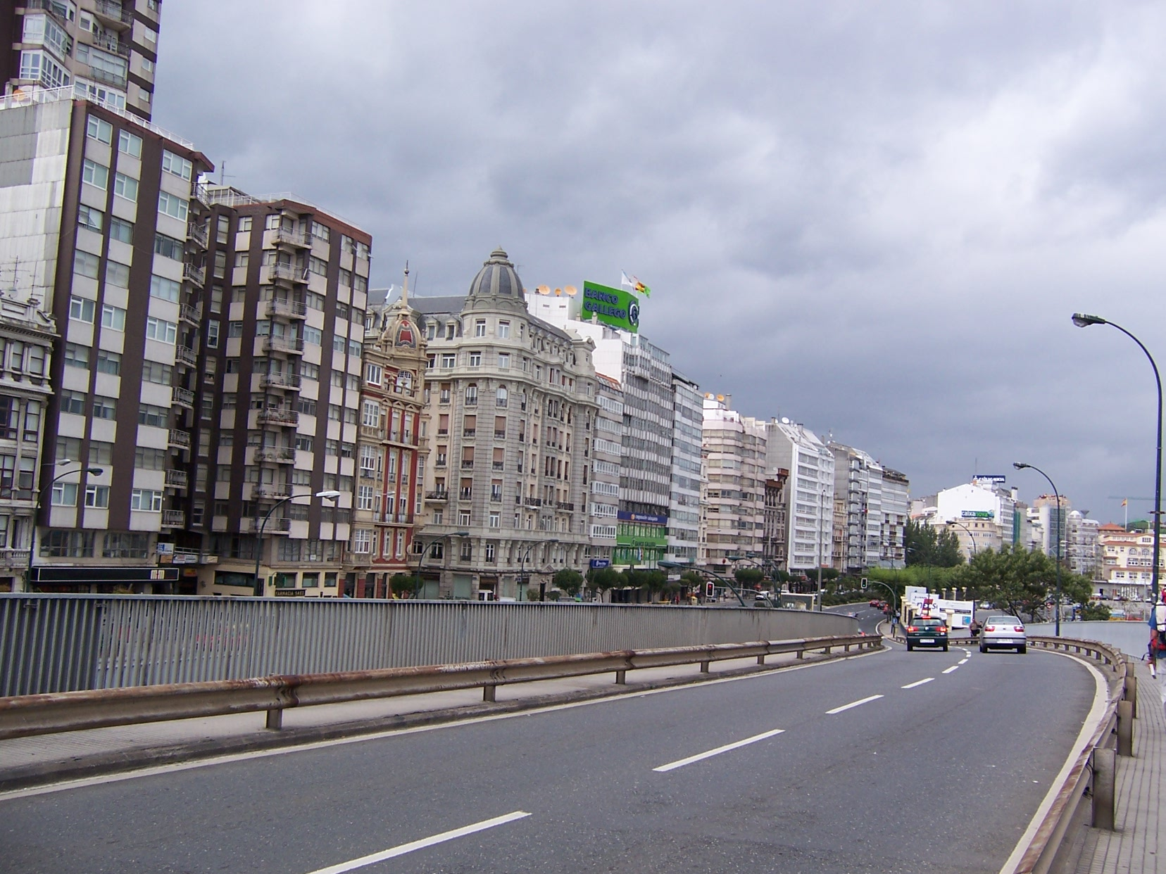 Spain 2004 september KODAK 7440 camera Source: Daniel Csörföly